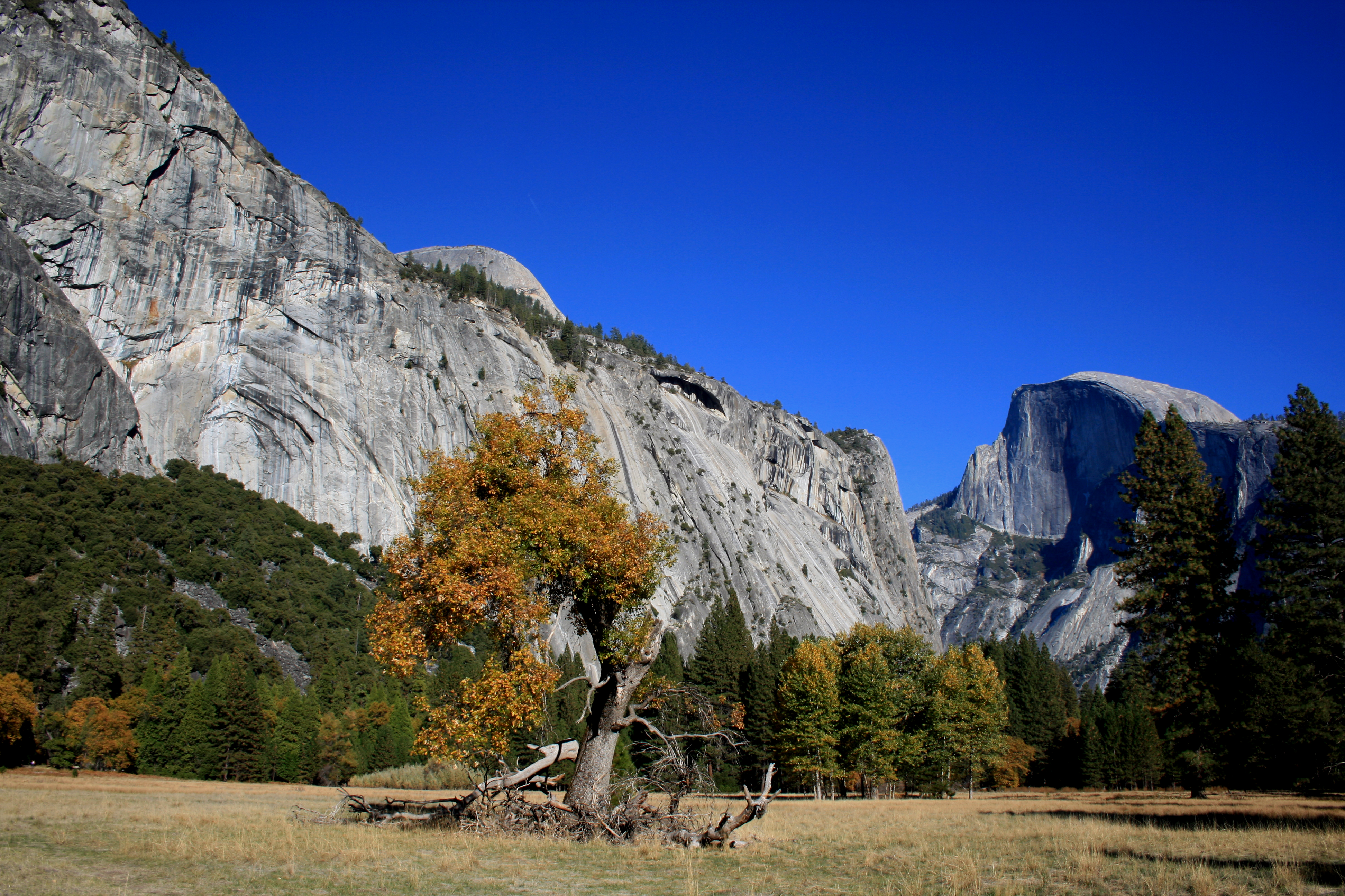 Fall in Yosemite National Park - Quercus kelloggii.